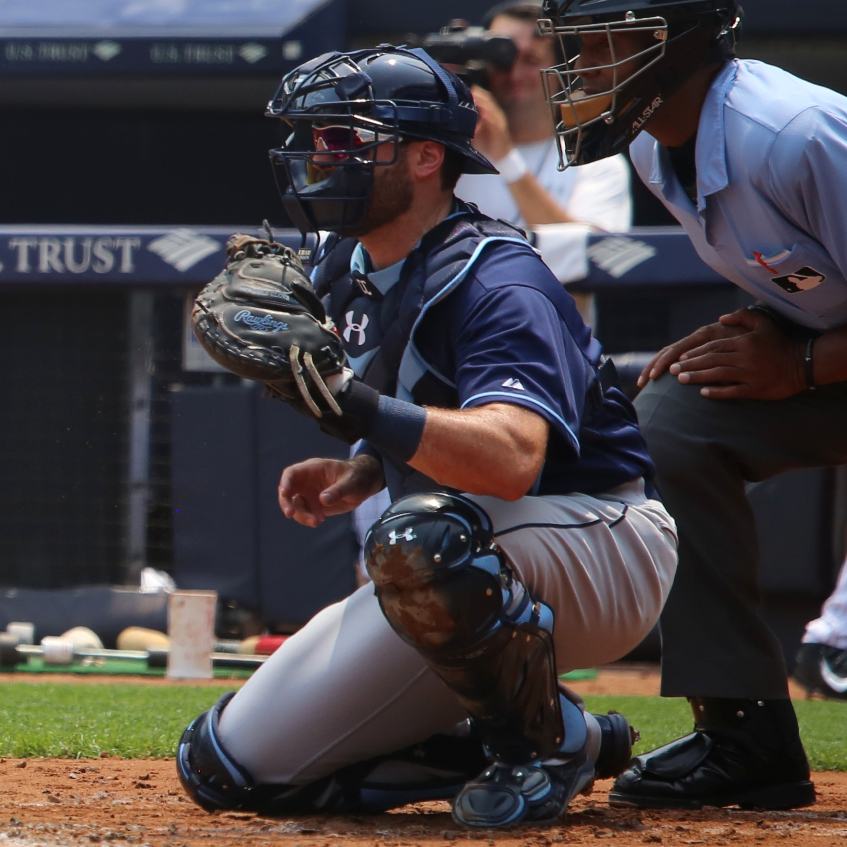 Curt Casali